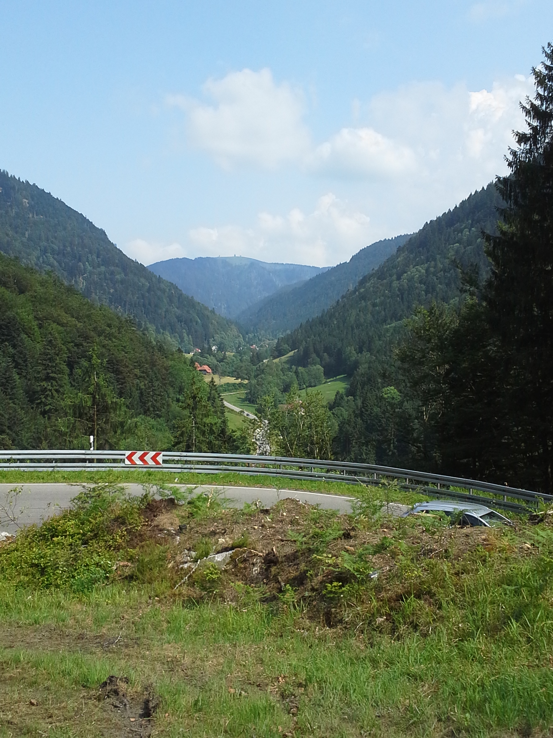 Blick von Nordwesten durchs St. Wilhelmer Tal auf den Feldberg